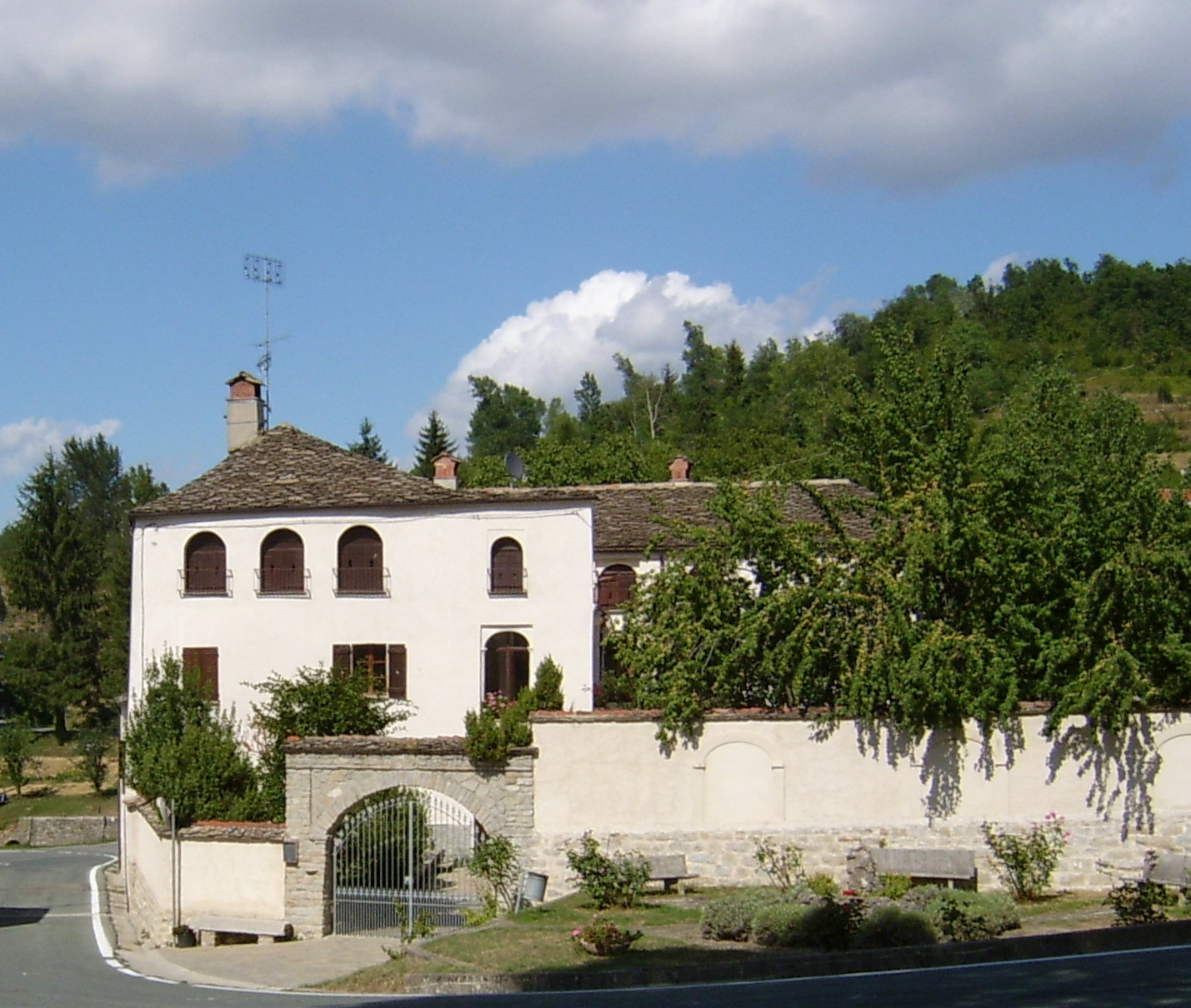 Fotografia della "Casa della maestra" dei racconti di Fenoglio, San Benedetto Belbo